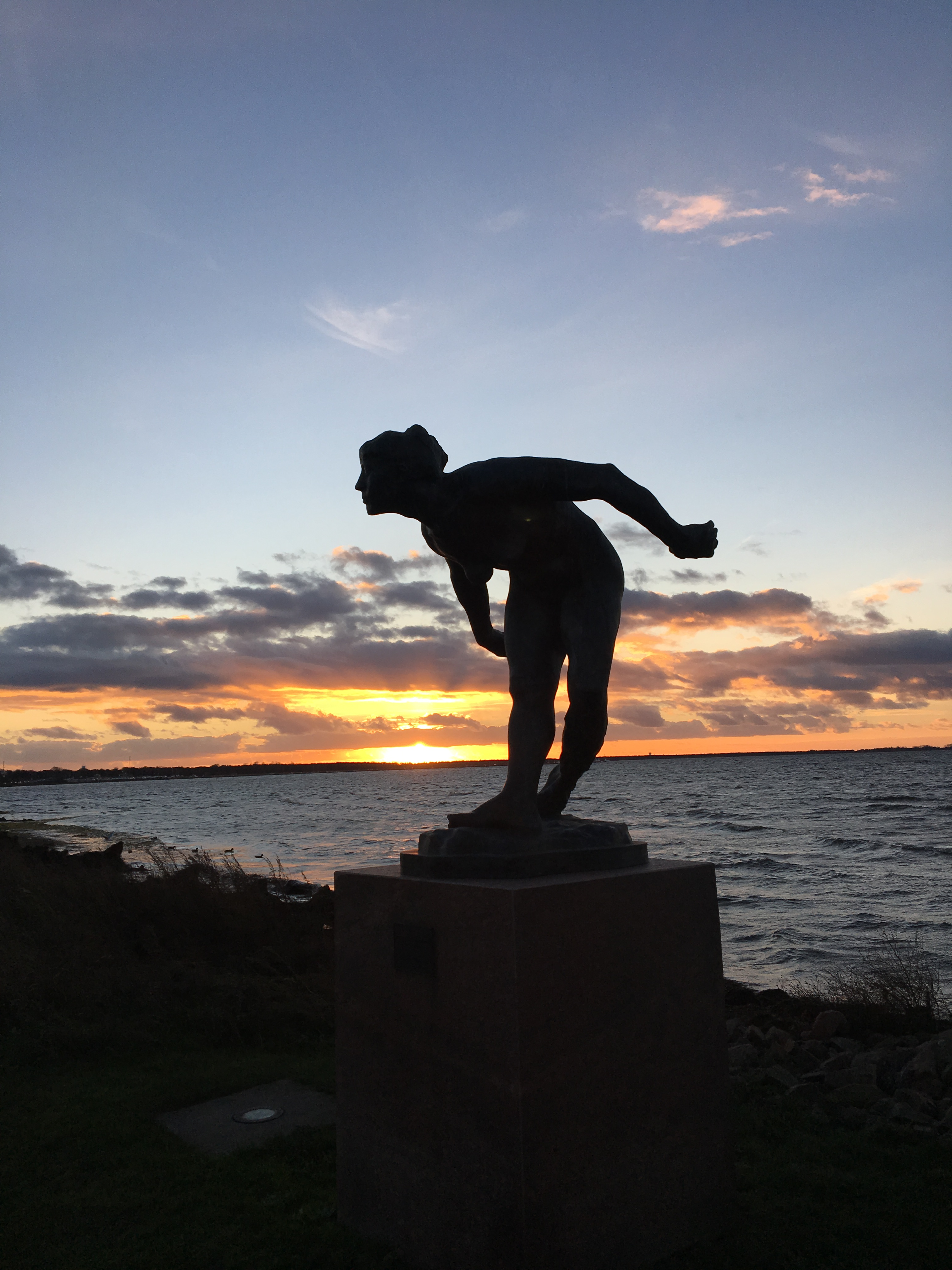 Skulptur vid Höllviken Falsterbonäset Open Air Museum